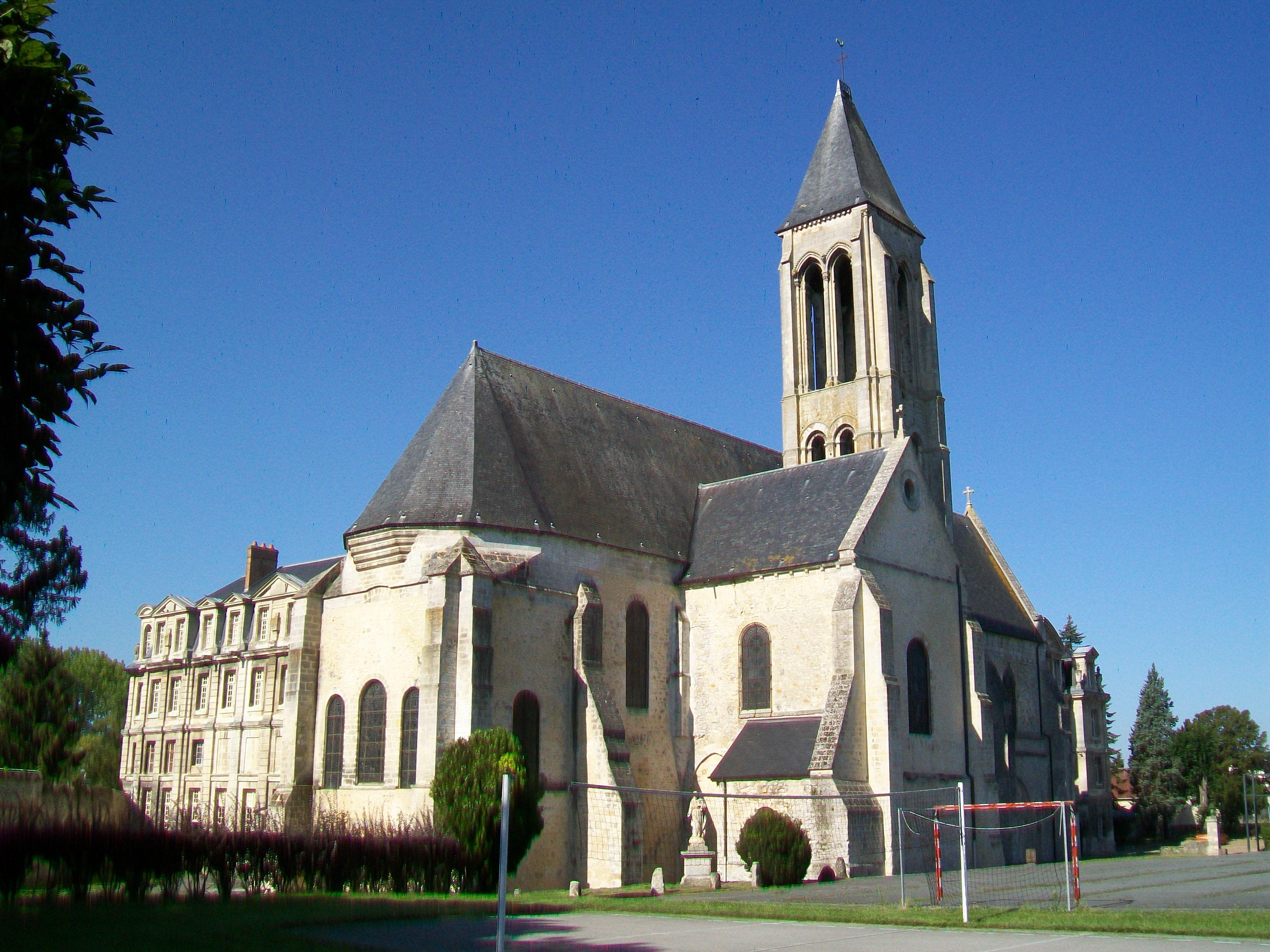 Vue sur l'ancienne abbaye et l'église depuis le nord-est.